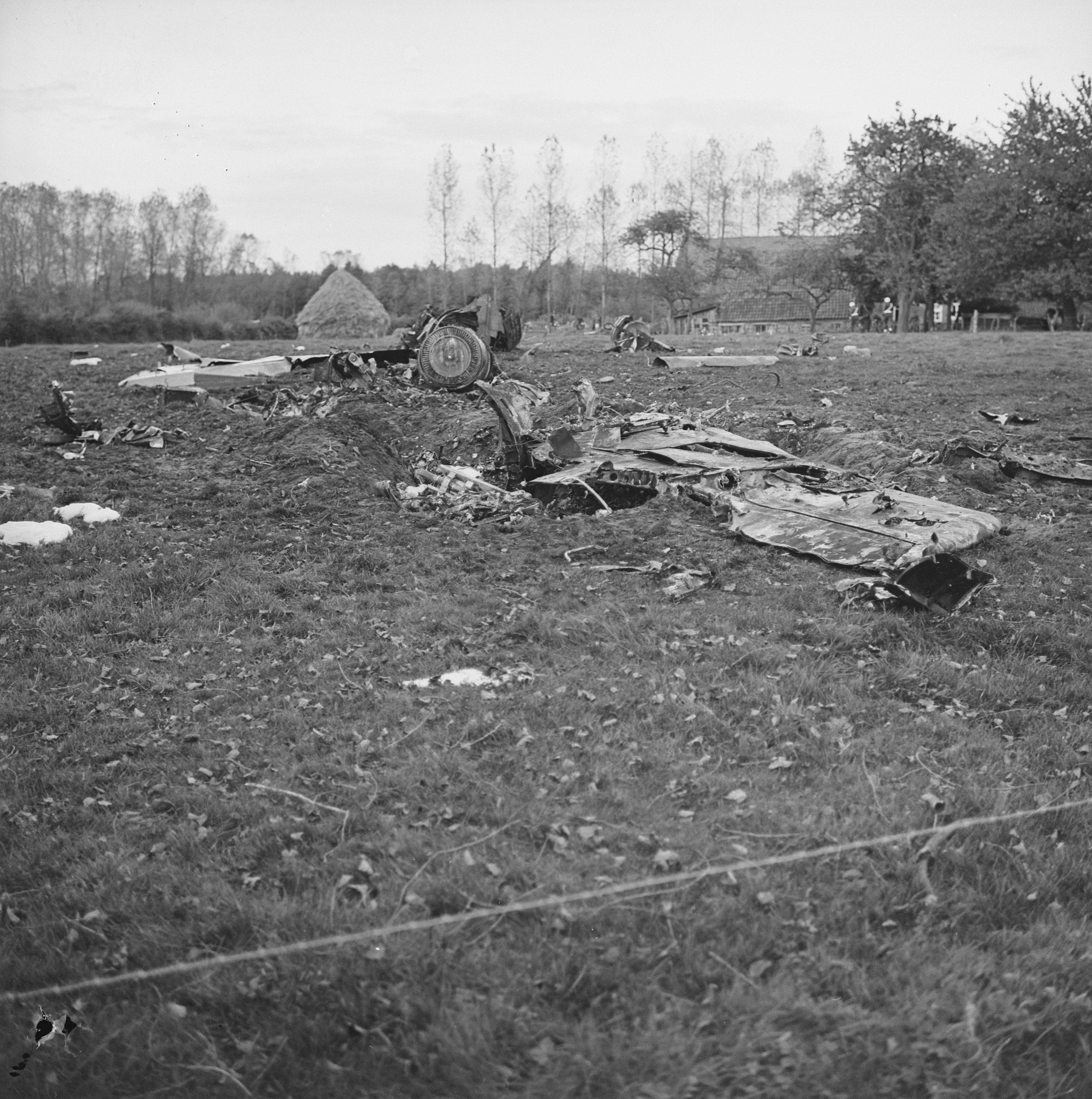 Collectie / Archief : Fotocollectie Anefo Reportage / Serie : [ onbekend ] Beschrijving : Twee straaljagers neergestort in Olland nabij Boxtel. Een van de wrakken Datum : 14 oktober 1963 Locatie : Boxtel Trefwoorden : STRAALJAGERS, WRAKKEN Fotograaf : Koch, Eric / Anefo Auteursrechthebbende : Nationaal Archief Materiaalsoort : Negatief (zwart/wit) Nummer archiefinventaris : bekijk toegang 2.24.01.03 Bestanddeelnummer : 915-6335